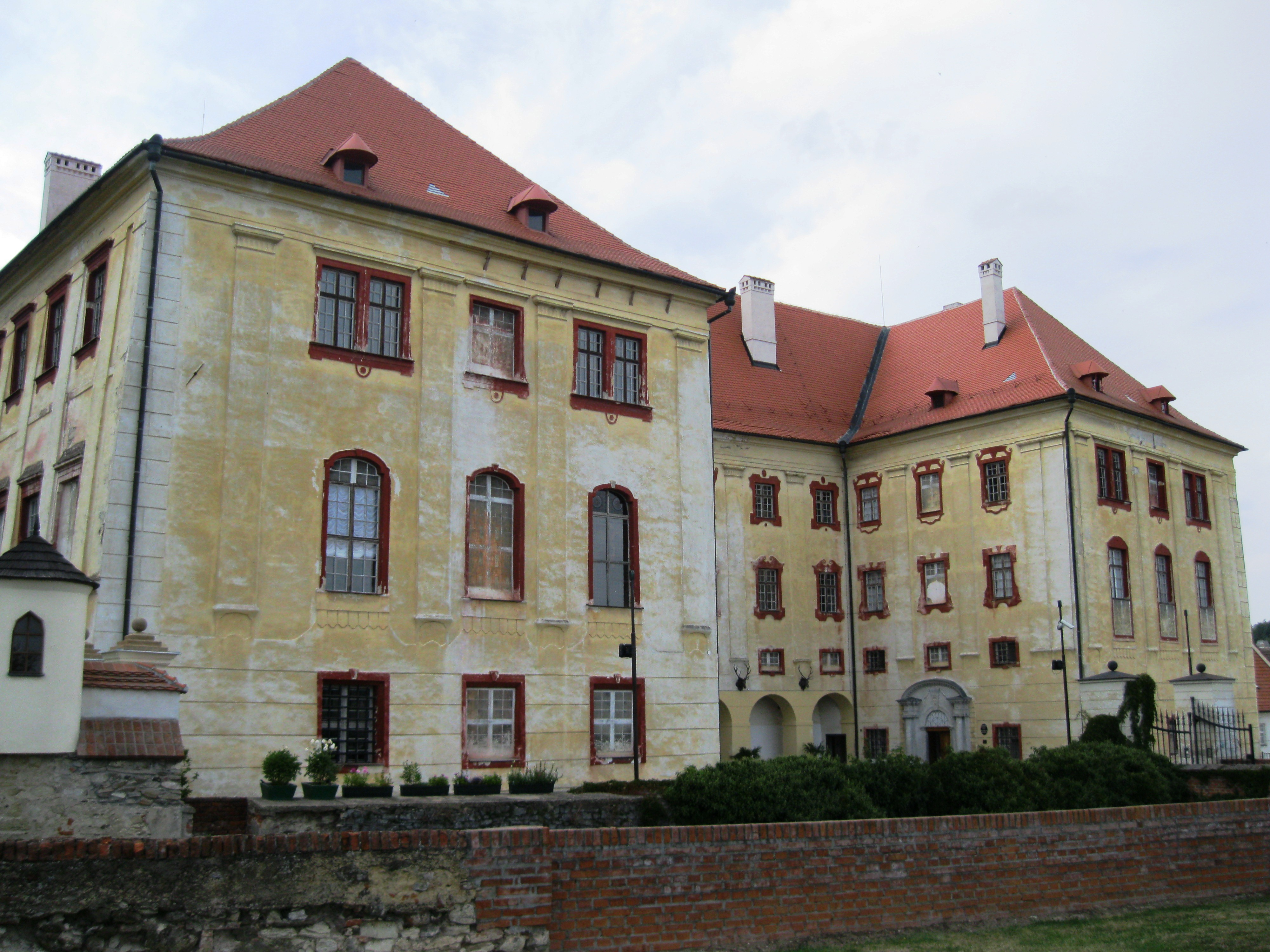 Zámek Kunštát